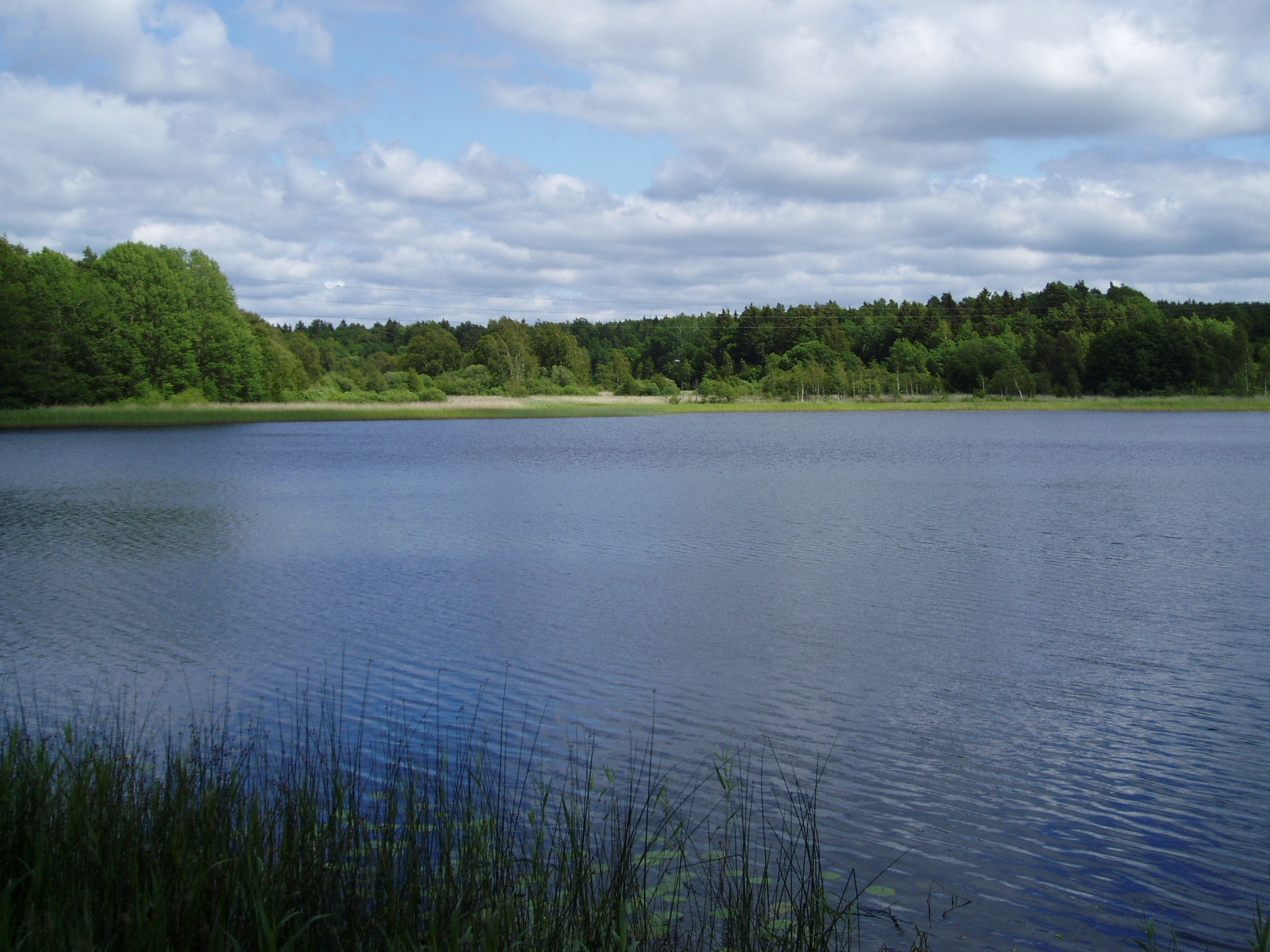 Vardsjön, Alingsås kommun